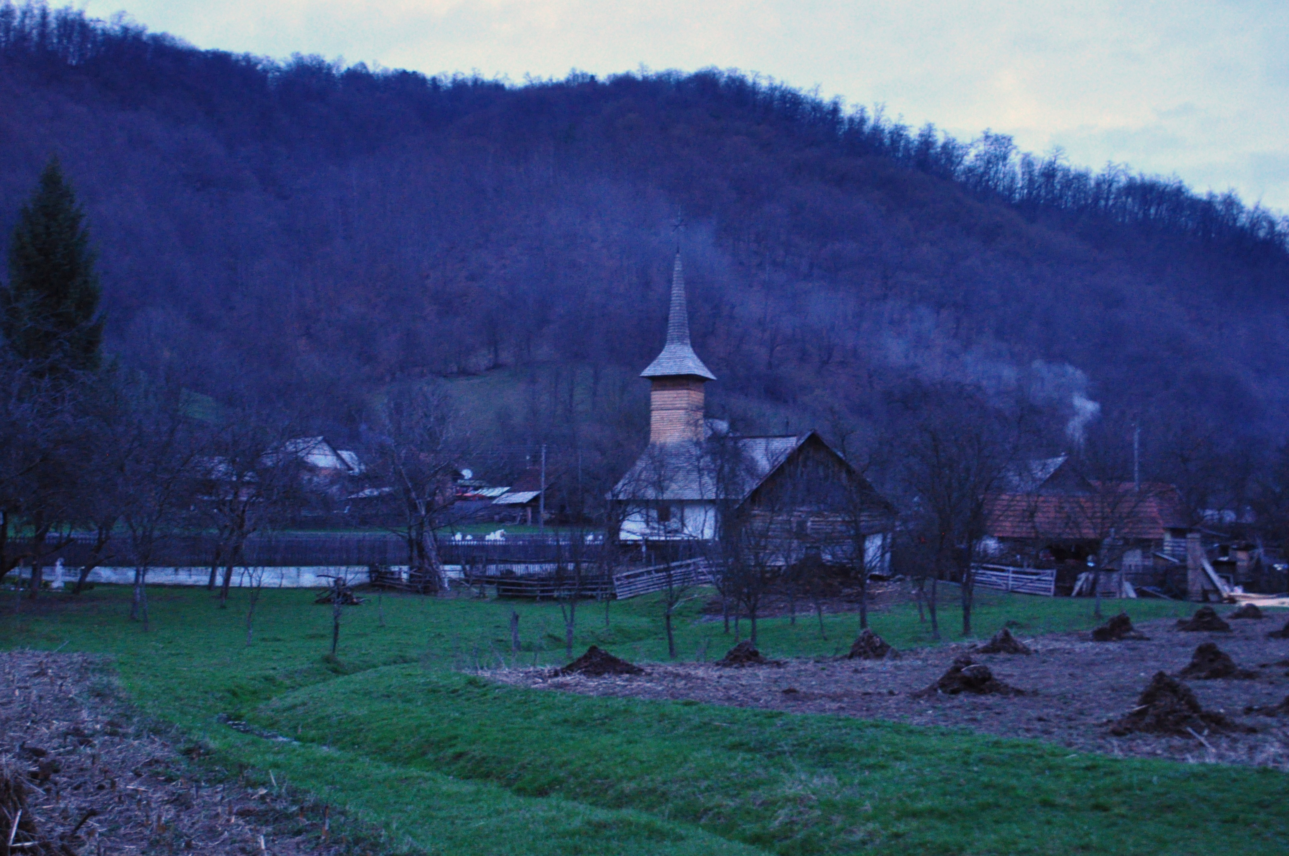 Biserica de lemn „Adormirea Maicii Domnului”,sat STĂNIJA; comuna BUCEŞ